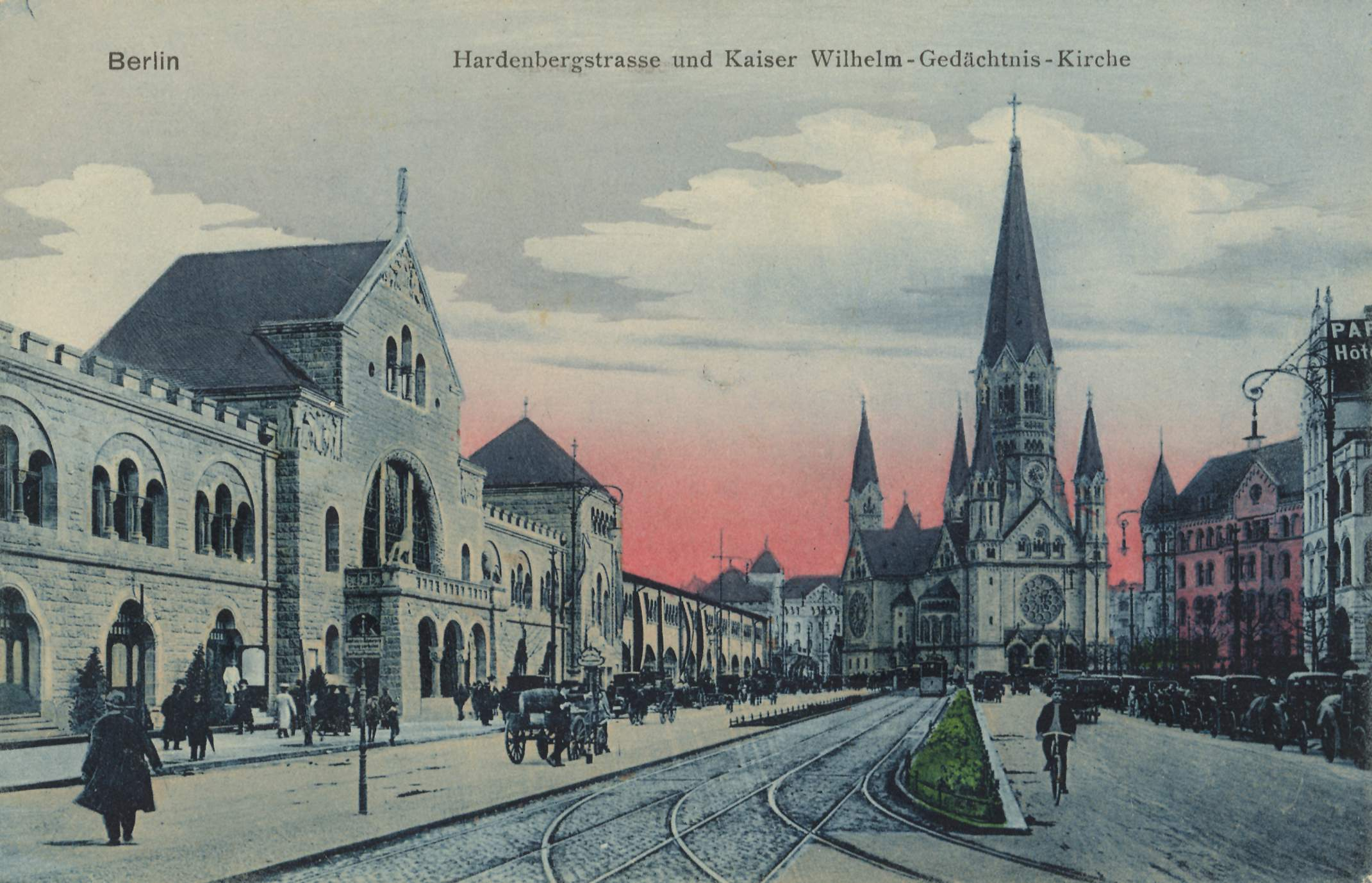 Blick von der Hardenbergstraße zur Kaiser-Wilhelm-Gedächtniskirche. Links die Ausstellungshallen am Zoologischen Garten, später Ufa-Palast am Zoo.